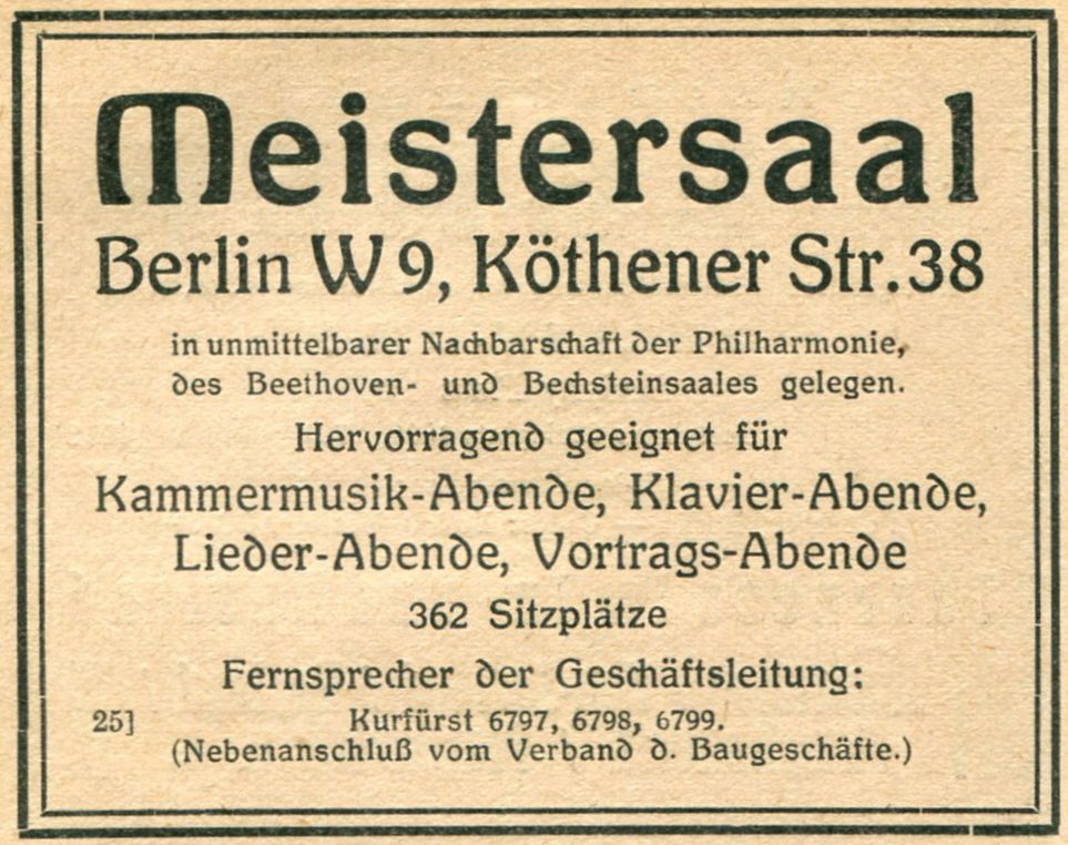 Werbeanzeige für den Meistersaal, aus Hesses Musiker-Kalender Berlinː Max Hesse 1932. Band 1, Seite 74